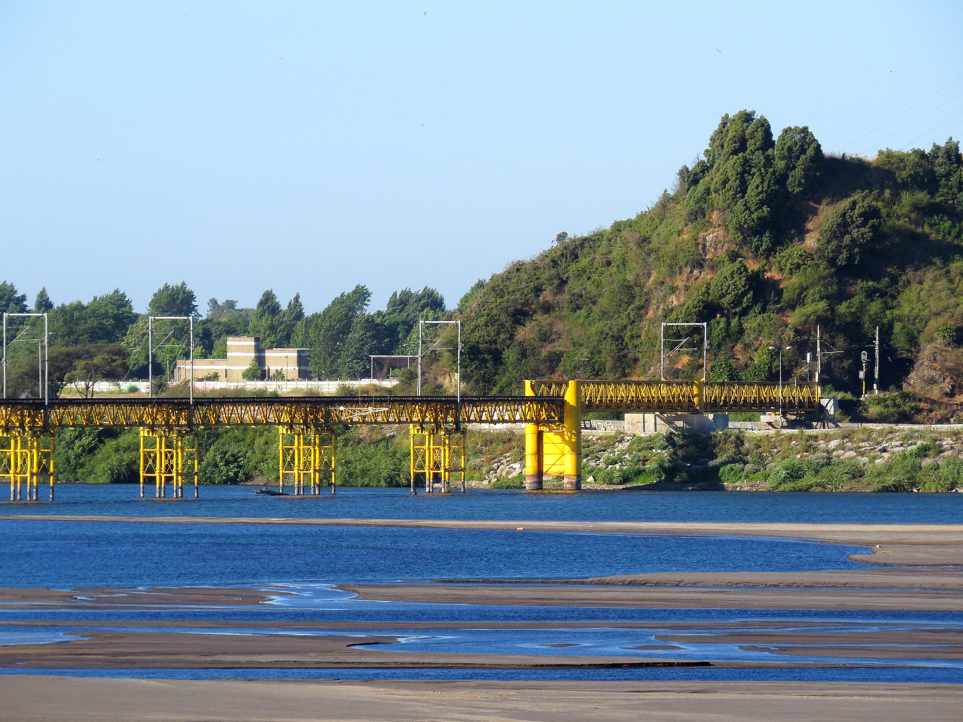 Puente Ferroviario sobre el río BíoBío. Fotografía tomada desde el puente Llacolén